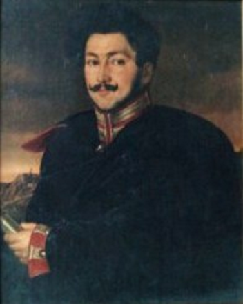 Porträt des Generalmajors und Autors Friedrich Wilhelm Eduard von Olberg (* 1800 in Potsdam, † 1863 in Berlin)